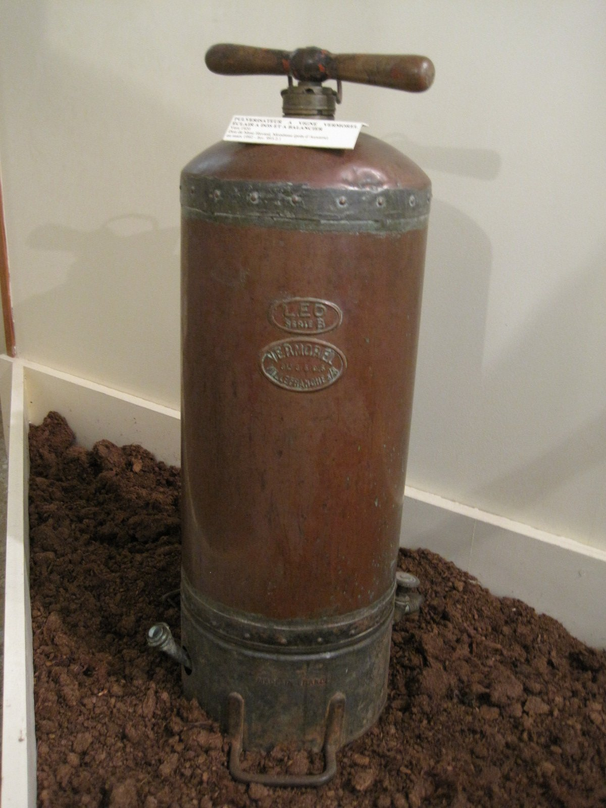 Hôtel des ducs de Bourgogne (Beaune)